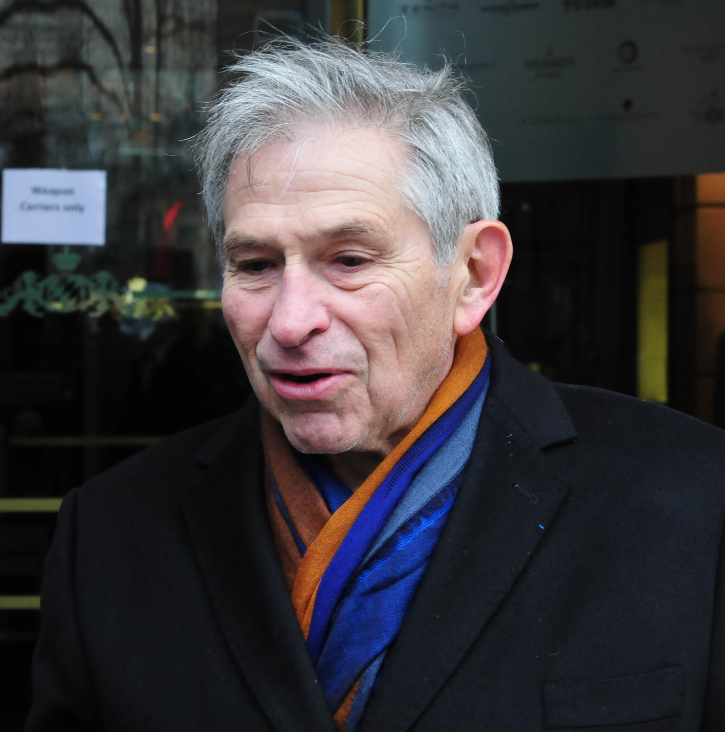 Munich Security Conference 2015 - Münchner Sicherheitskonferenz 2015